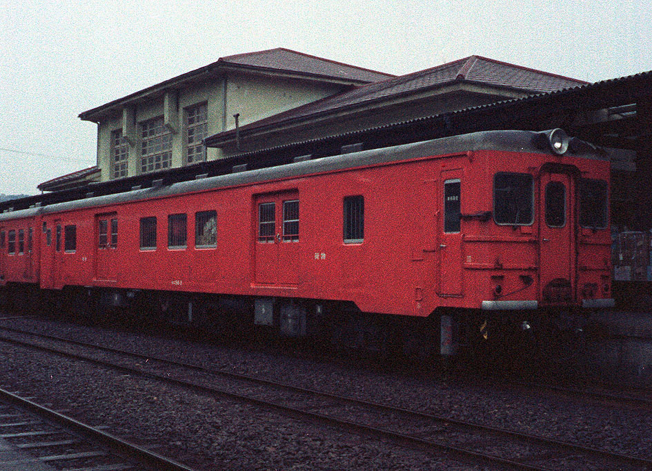 国鉄キニ56 2